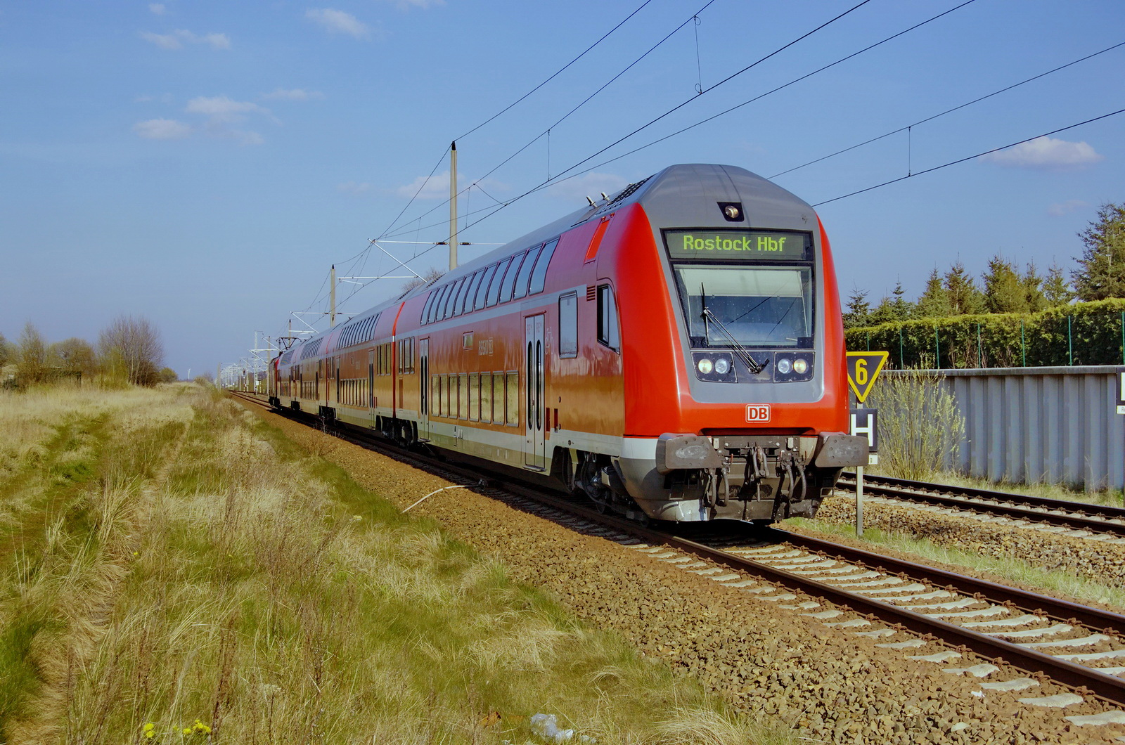 DBpza Doppelstockwagen (4. Generation) in Ribnitz-Damgarten Ost